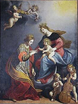 Sposalizio mistico di santa Caterina